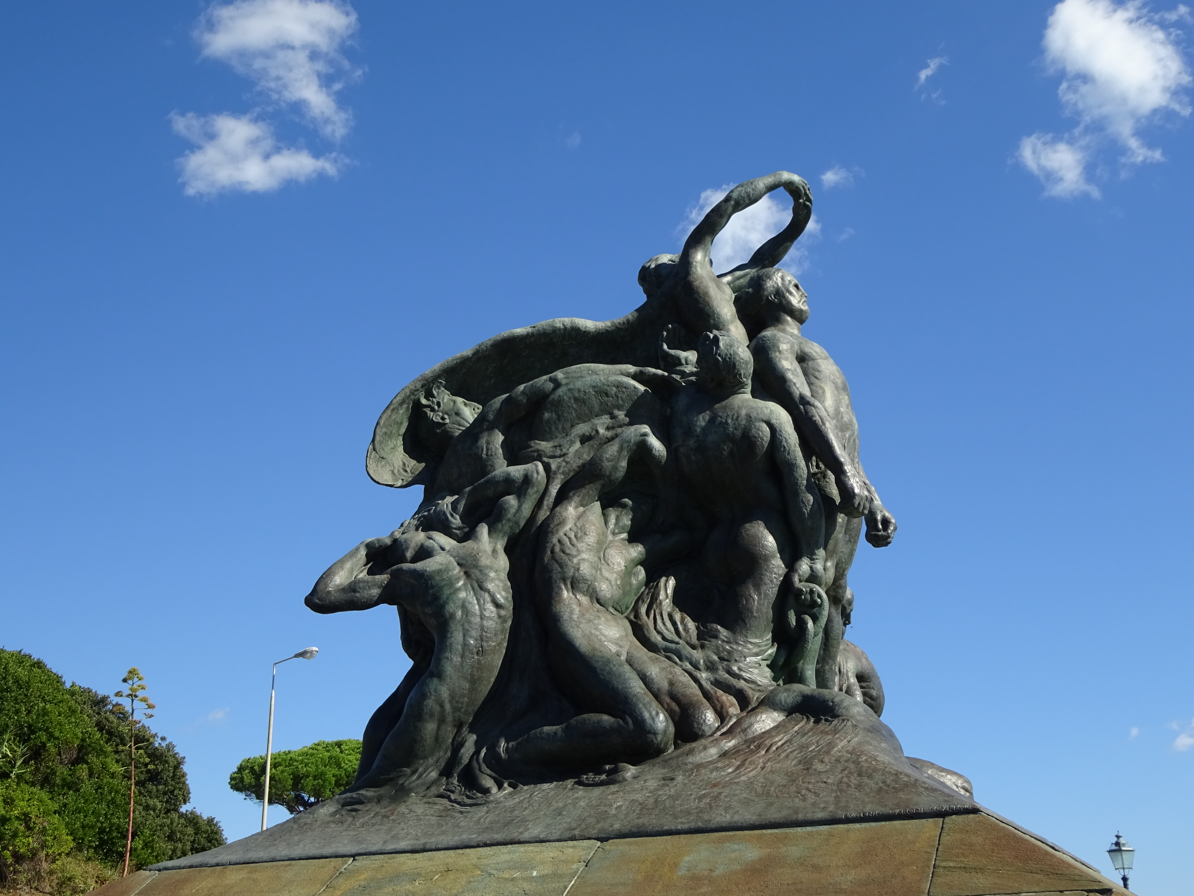 Monumento ai Mille This is a photo of a monument which is part of cultural heritage of Italy.